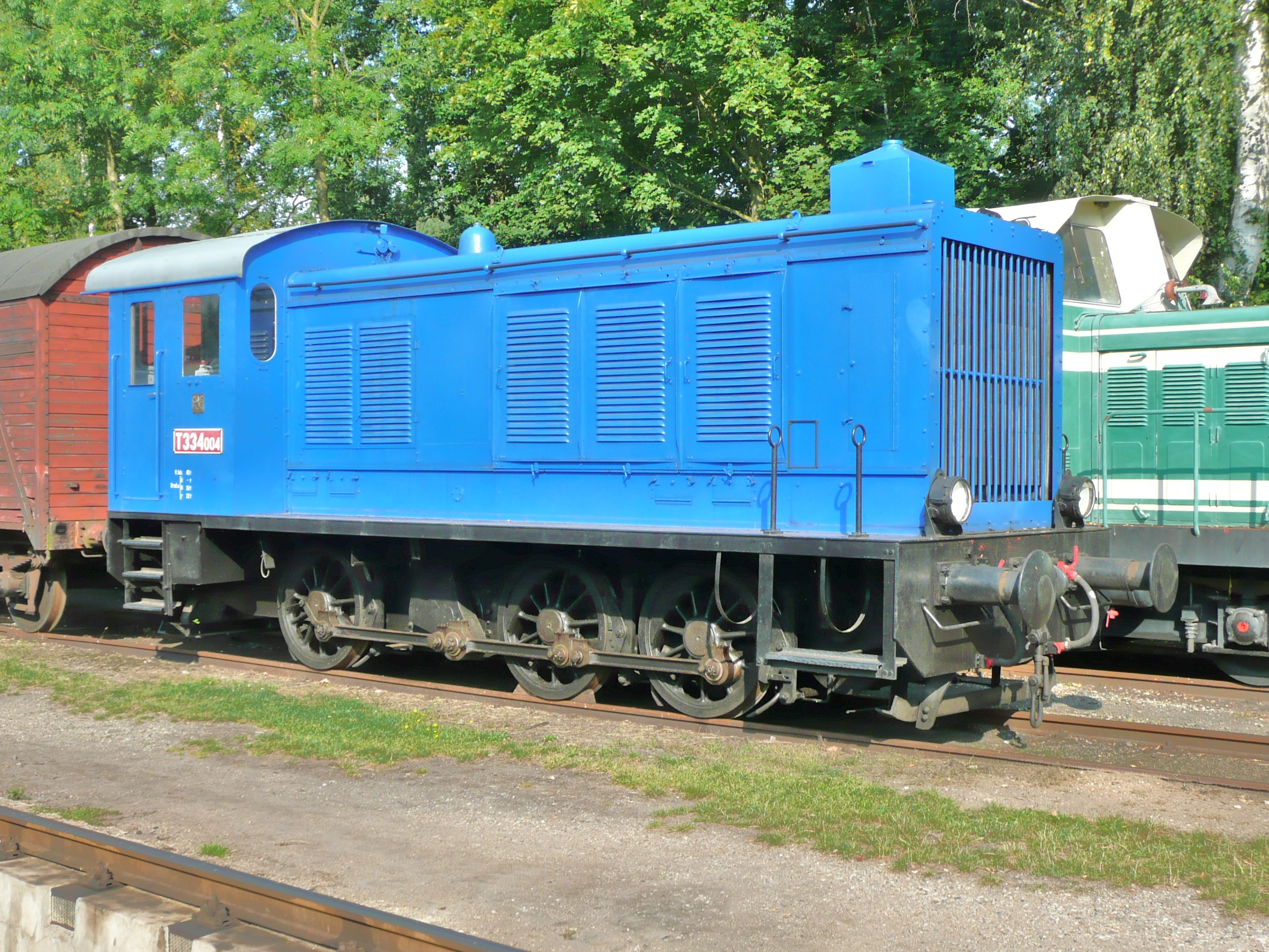 T 334 004 im Eisenbahnmuseum Luzna u Rakovnika